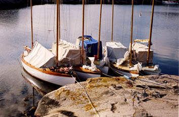 Förtöjda segelkanoter med bomtält